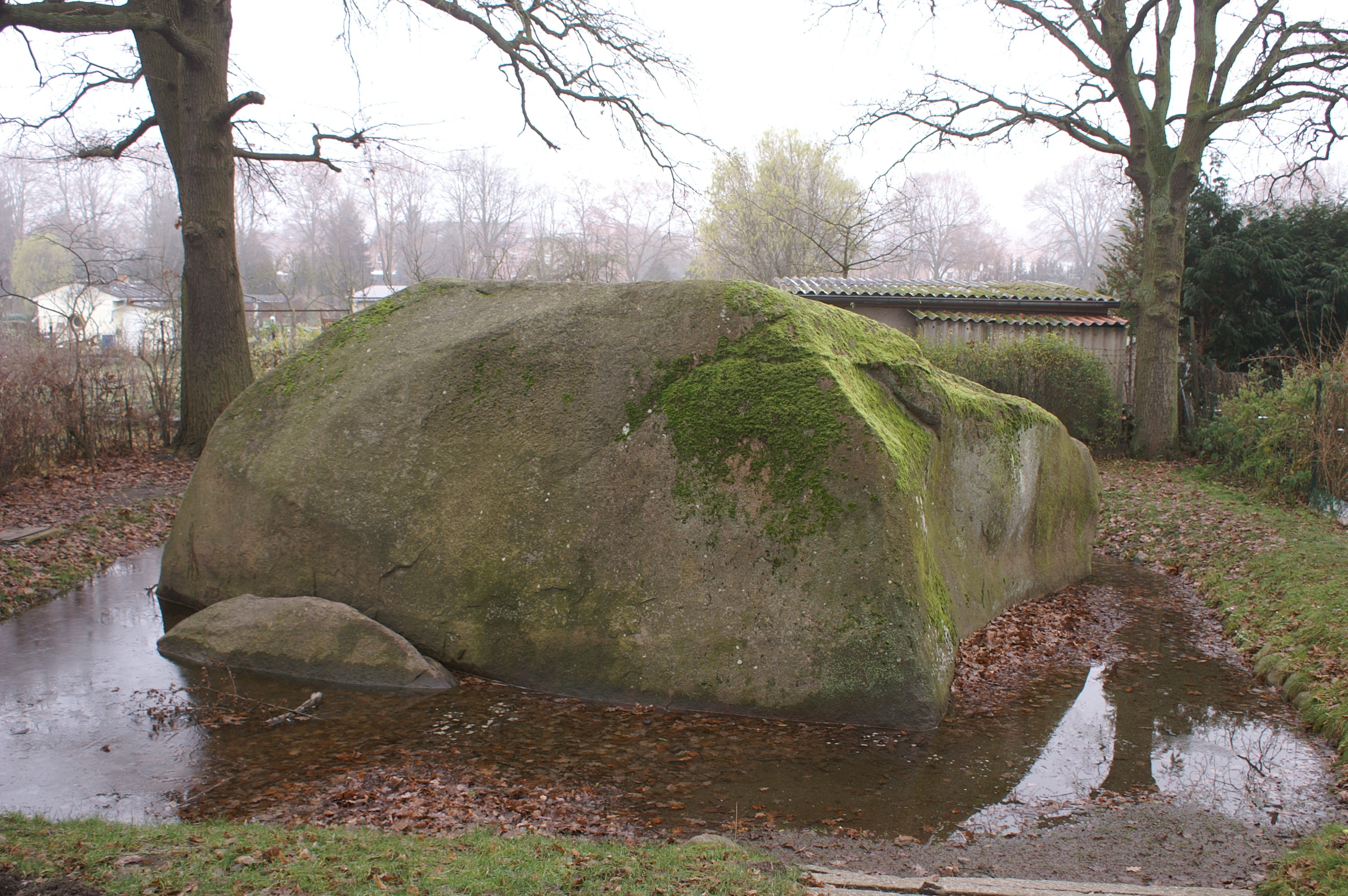 Großer Stein bei Altentreptow, Mecklenburg-Vorpommern